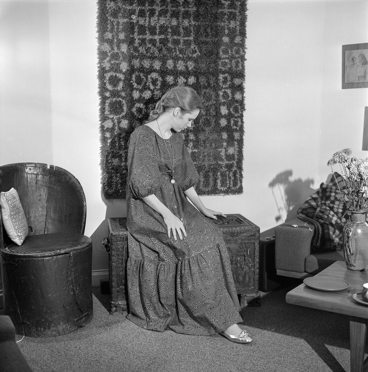 Liv Ullmann hjemme i Drammensveien 91, 1966